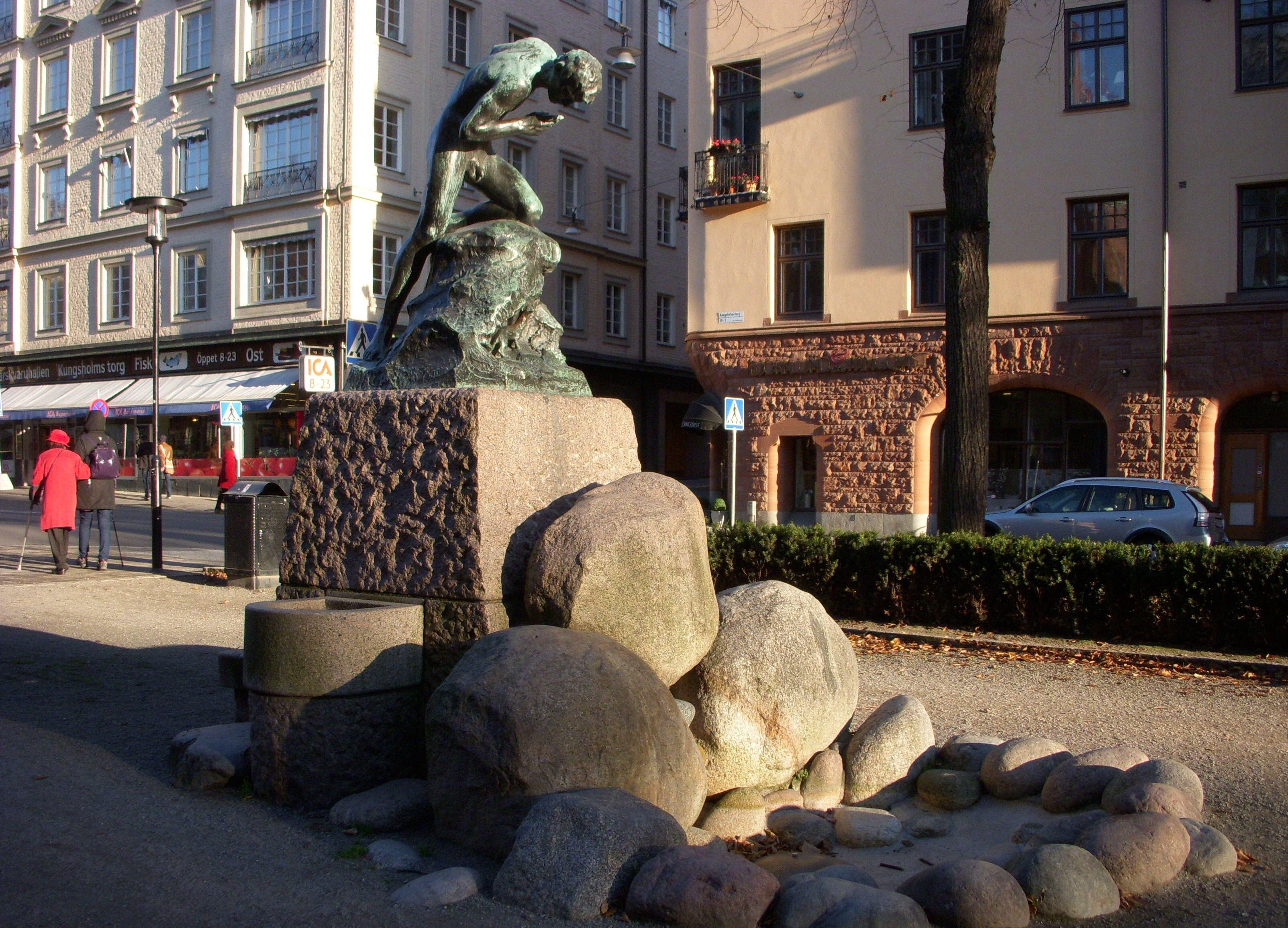 Otto Strandmans skulptur "Vesslan" på Kungsholmstorg i Stockholm